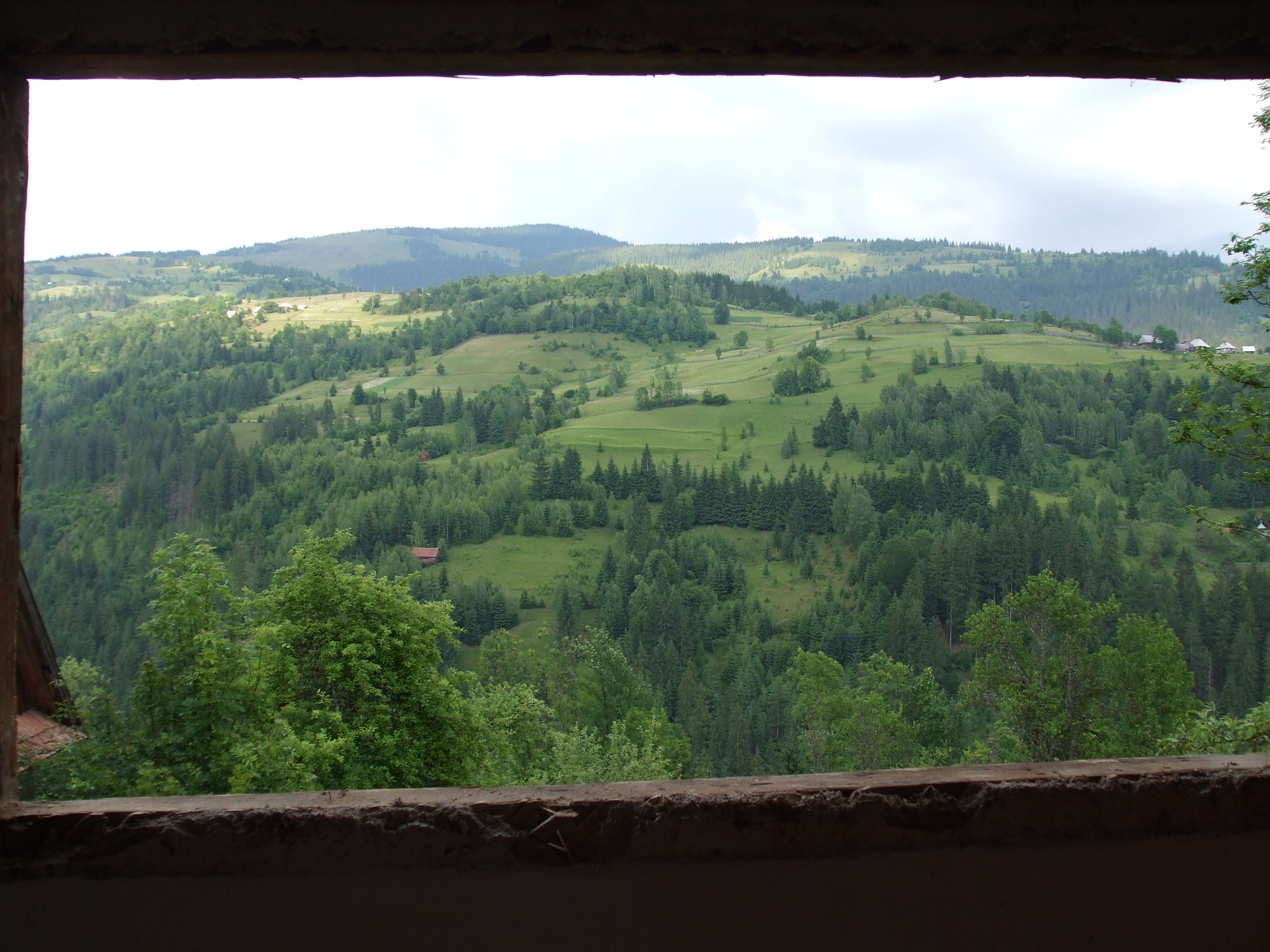 Horea, Alba Imagine din comuna Horea , jud.Alba { munţii Apuseni }.